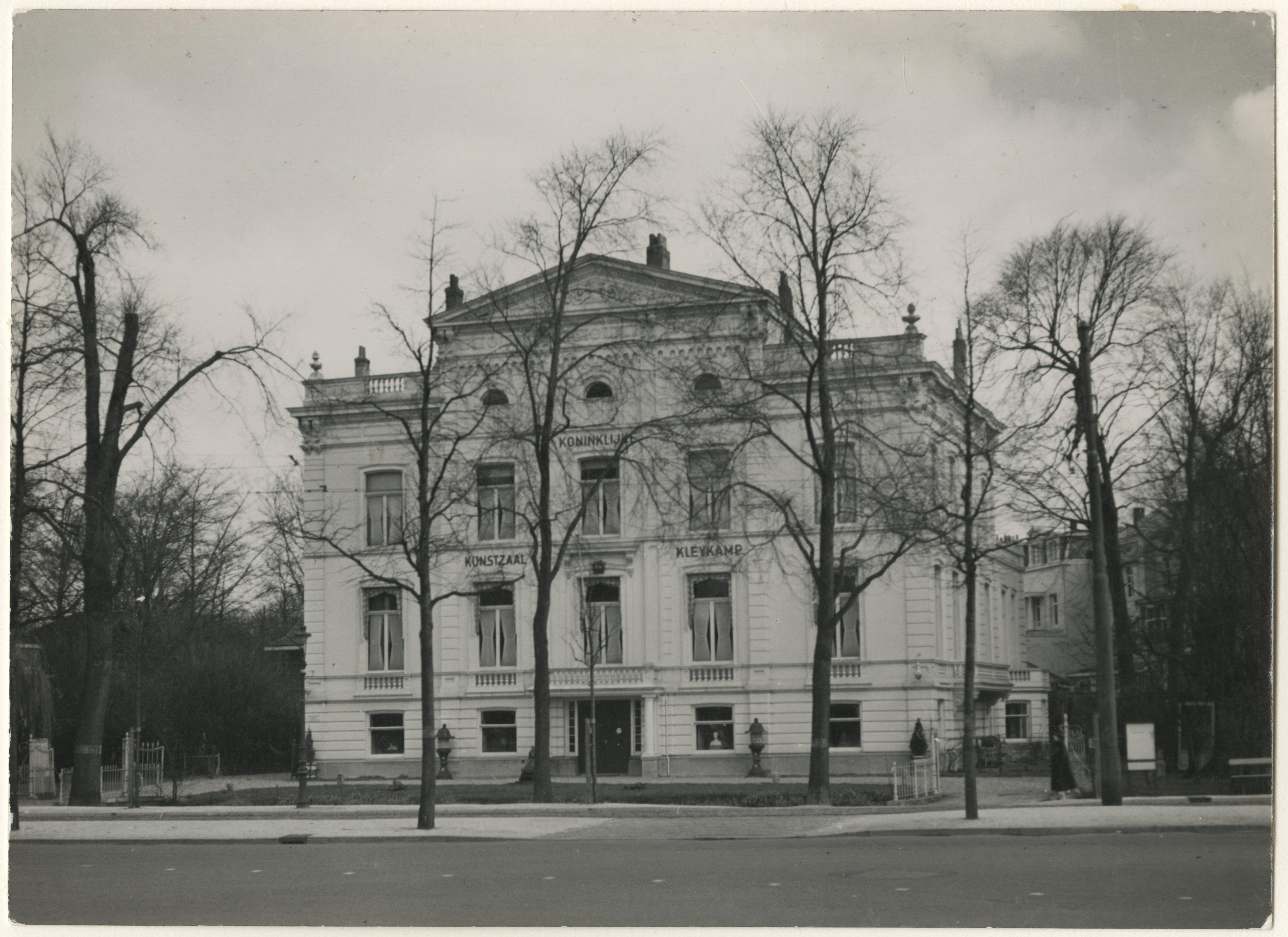 Scheveningseweg 17, Den Haag, Koninklijke Kunstzaal Kleykamp, sinds 1940/41 Rijksinspectie der Bevolkingsregisters, door Engelsen gebombardeerd op 11-4-1944, vele doden